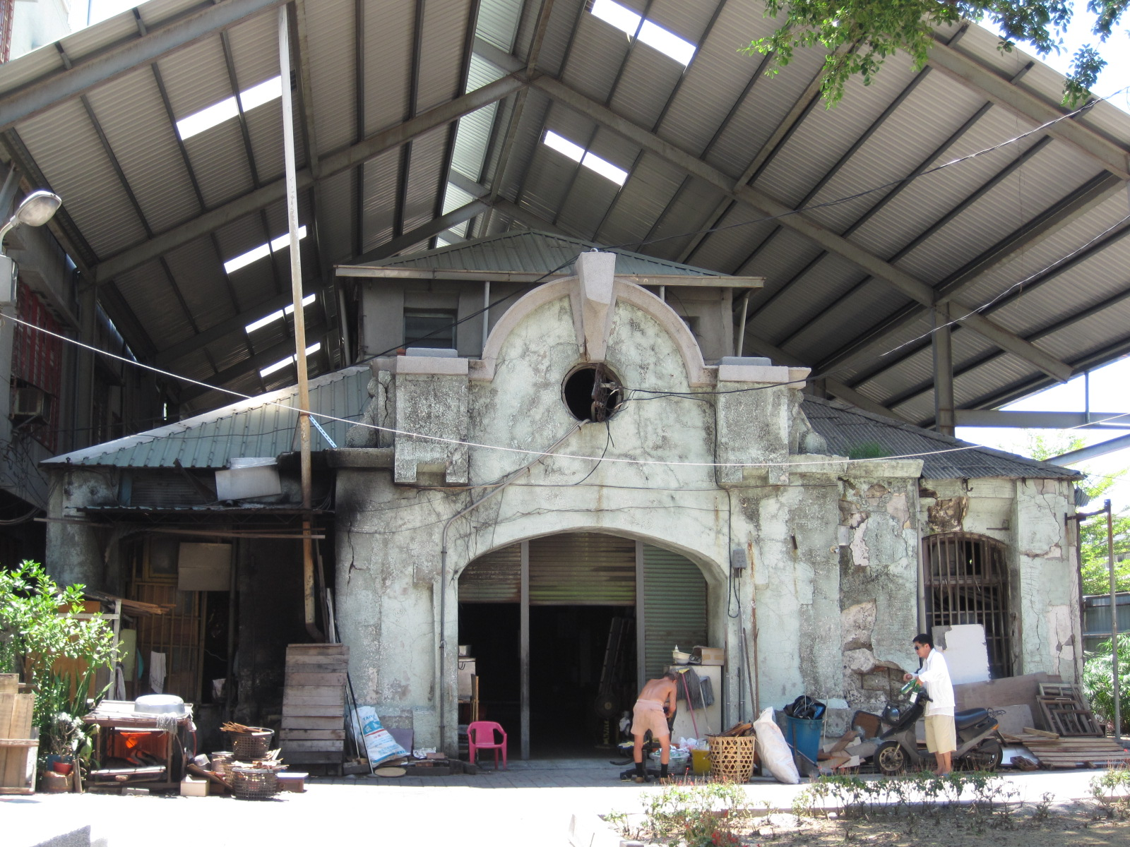 臺南市西市場（正興街側的入口）